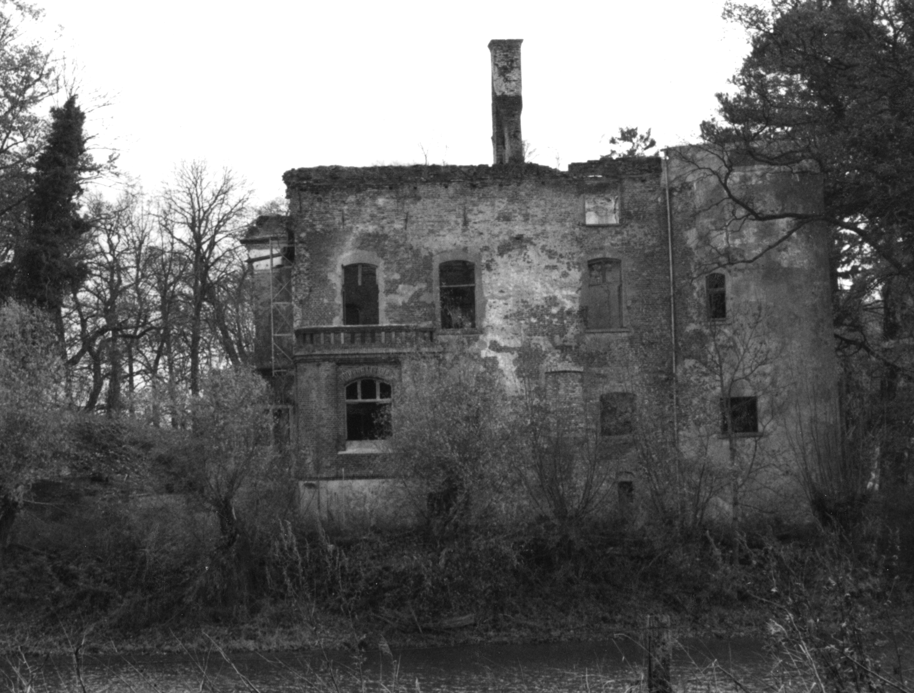 Haus of the family Van Boetzelaer in Kalkar before restauration